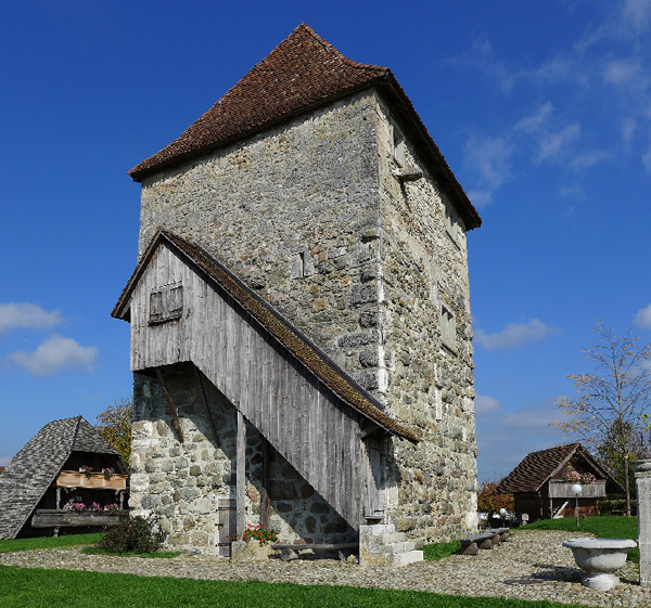 Burgturm, Halten, Kanton Solothurn, oberes Stockwerk im 16. Jahrhundert erneuert.